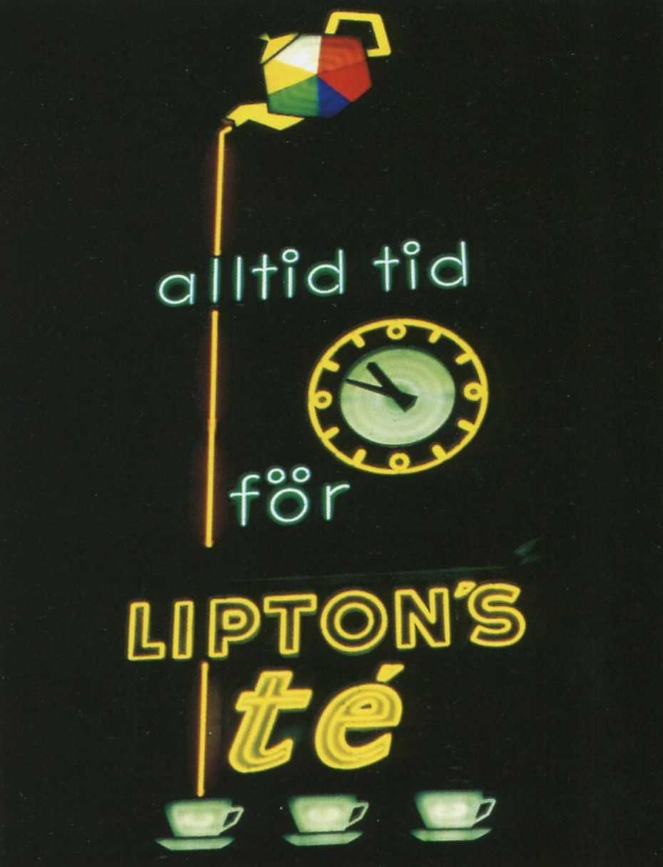 Neonskylt för Lipton's te